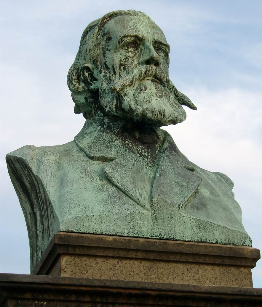 Wolfgang-Müller-von-Königswinter-Büste (1895/1896), Rheinallee, Königswinter